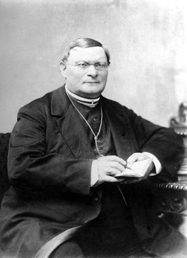 Rómer Flóris (teljes nevén Rómer Flóris Ferenc, Pozsony, 1815. április 12. – Nagyvárad, 1889. március 18.) régész, művészettörténész, festőművész, egyetemi tanár, a Magyar Tudományos Akadémia tagja, nagyváradi nagyprépost-kanonok. A magyar régészet atyja.